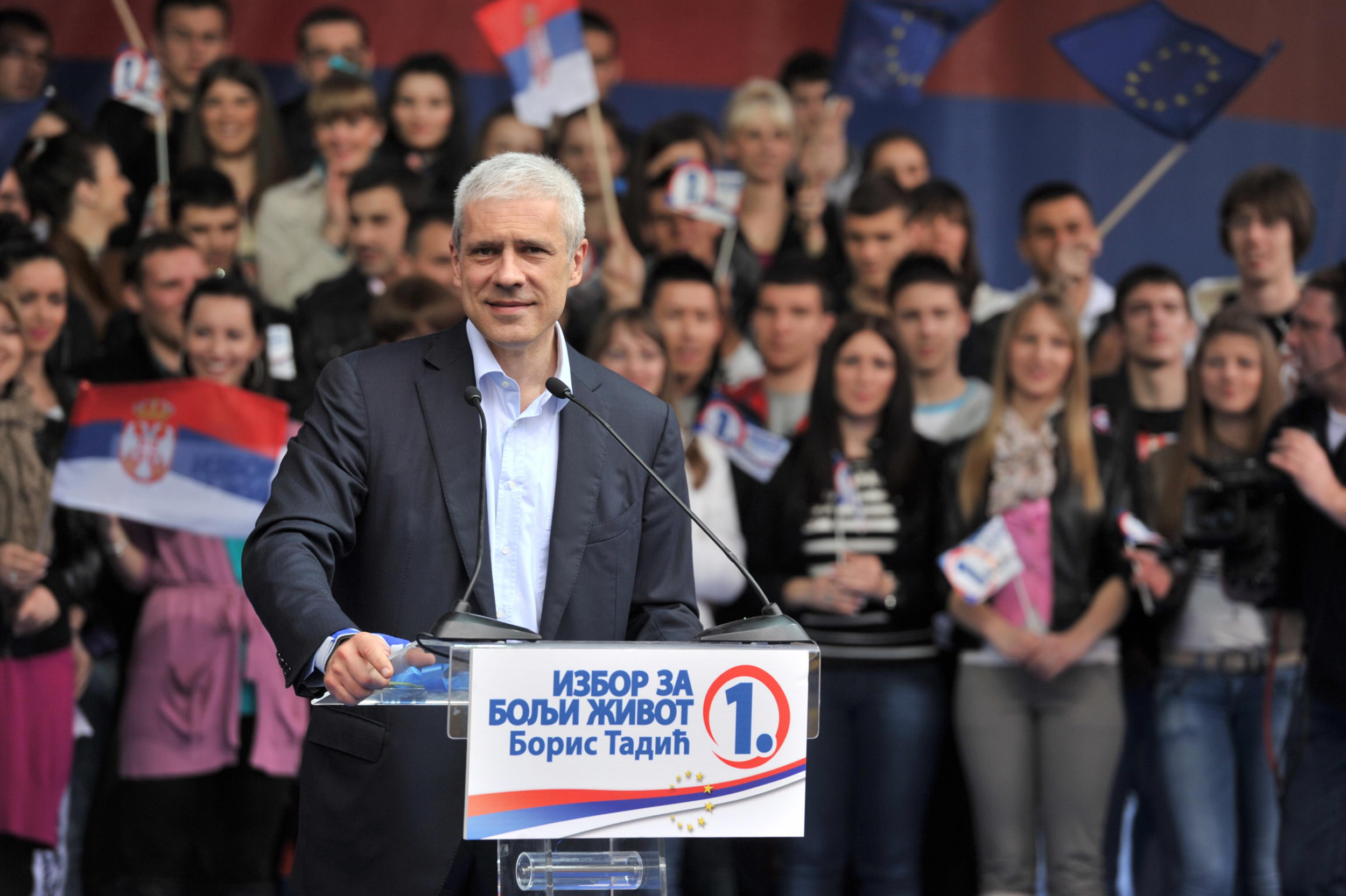 Predsednik Boris Tadić na konvenciji liste "Izbor za bolji život — Boris Tadić" u Prokuplju (6. april 2012); Foto servis DS